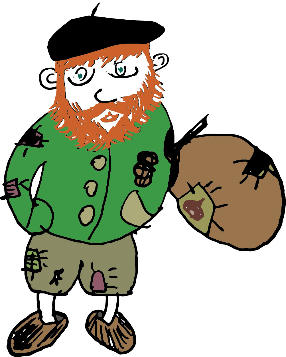 Ilustración do Apalpador. Traballo liberado para uso na Wikipedia.